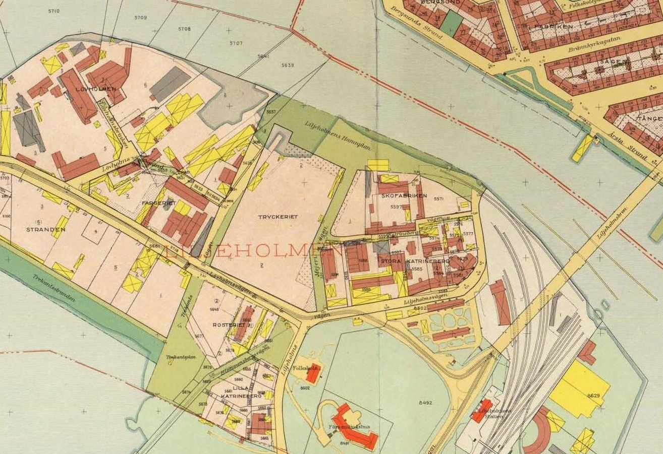 Del av karta över Stockholm visande Liljeholmen